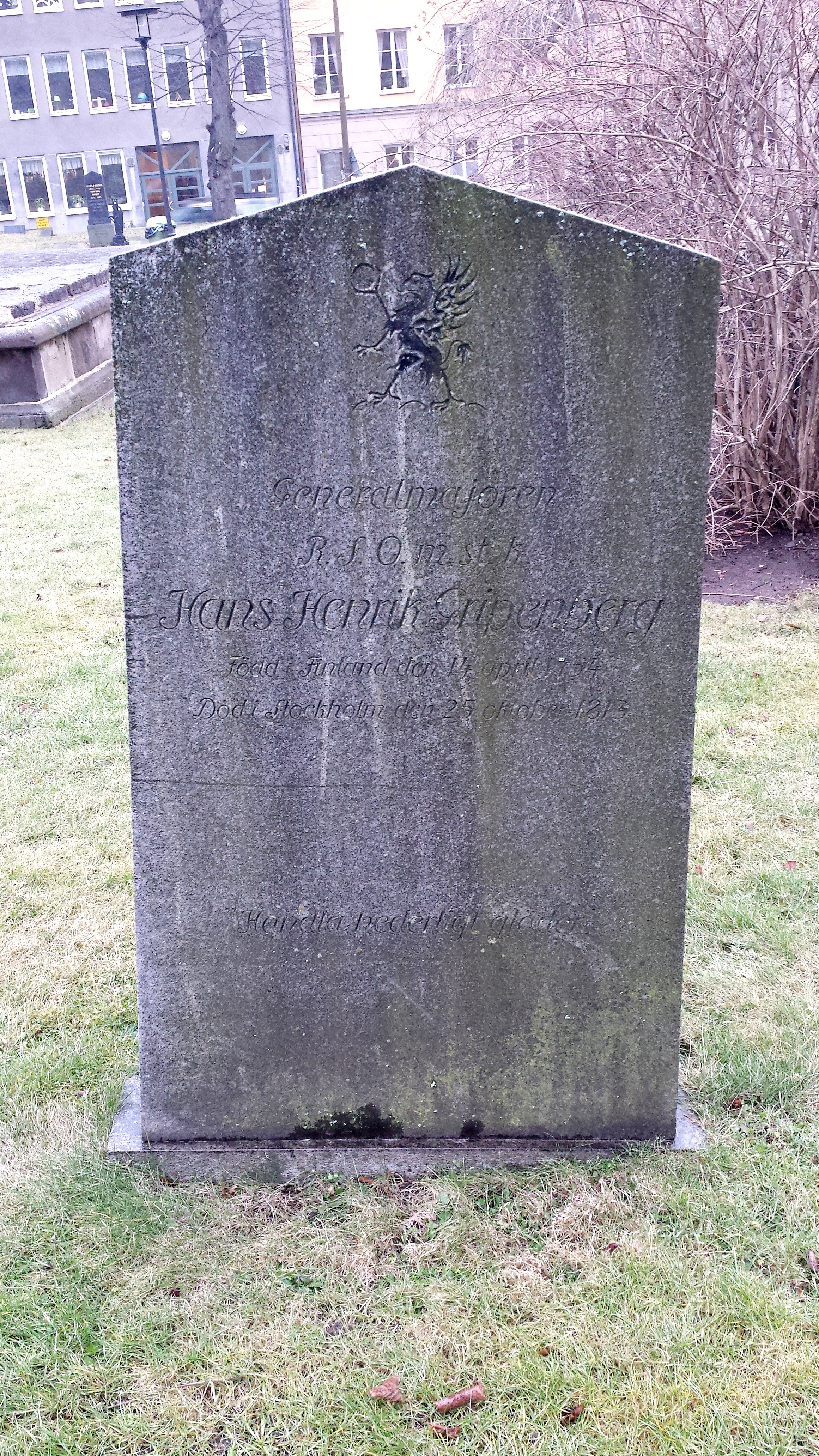 Hans Henrik Gipenbergs gravsten Johannes kyrkogård Stockholm